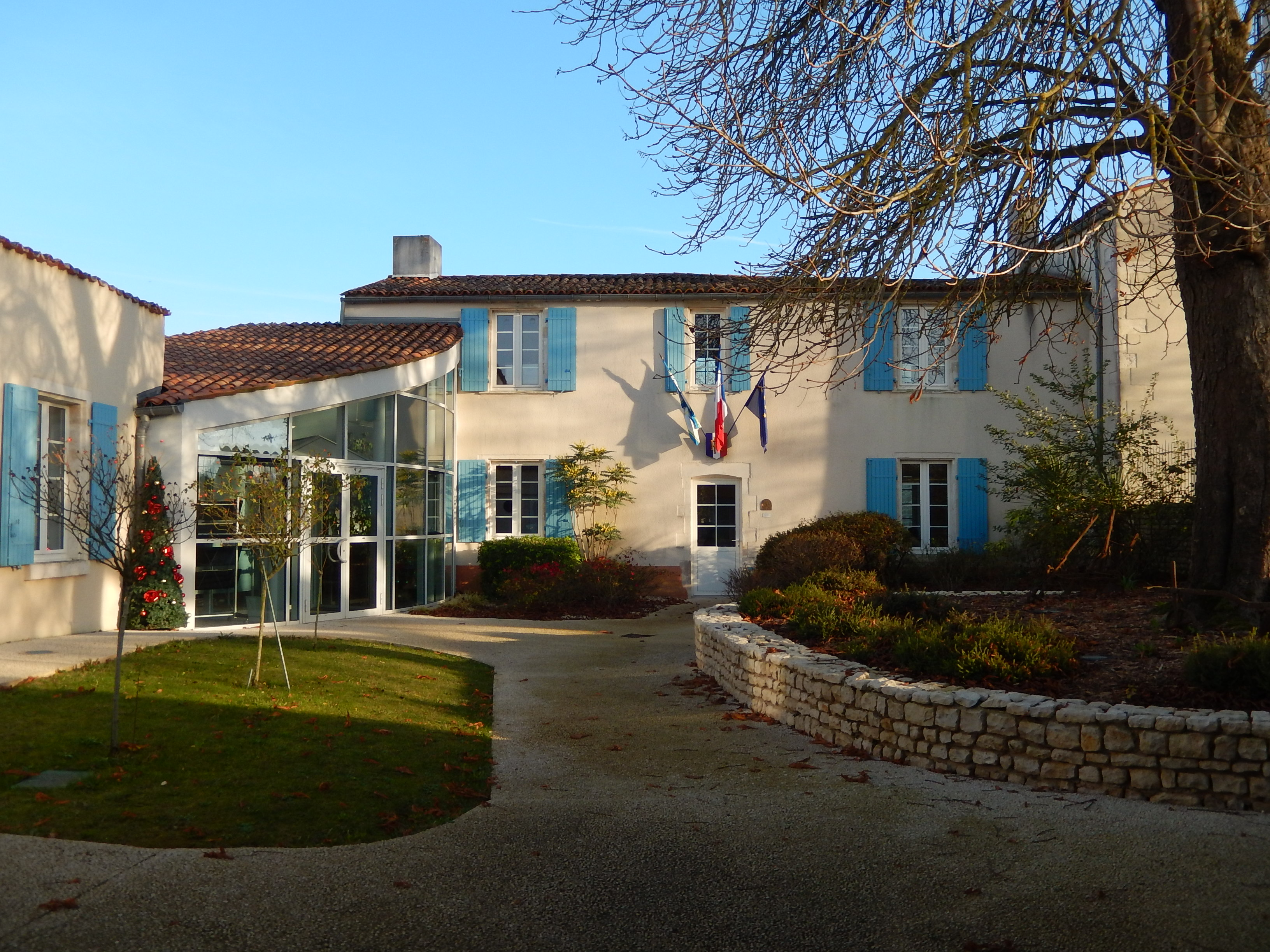 La mairie de Longèves (Charente-Maritime, France).